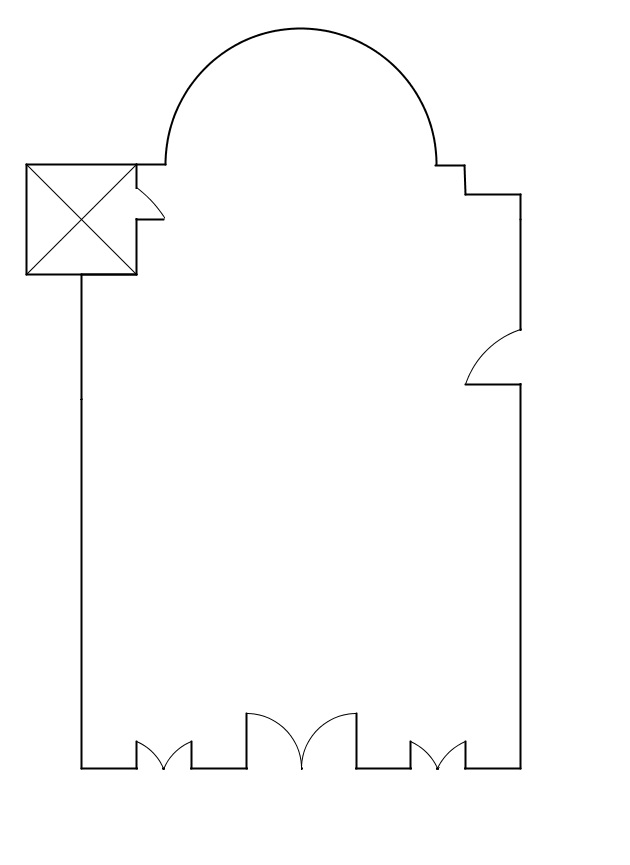 Pianta chiesa di San Vigilio, Pez